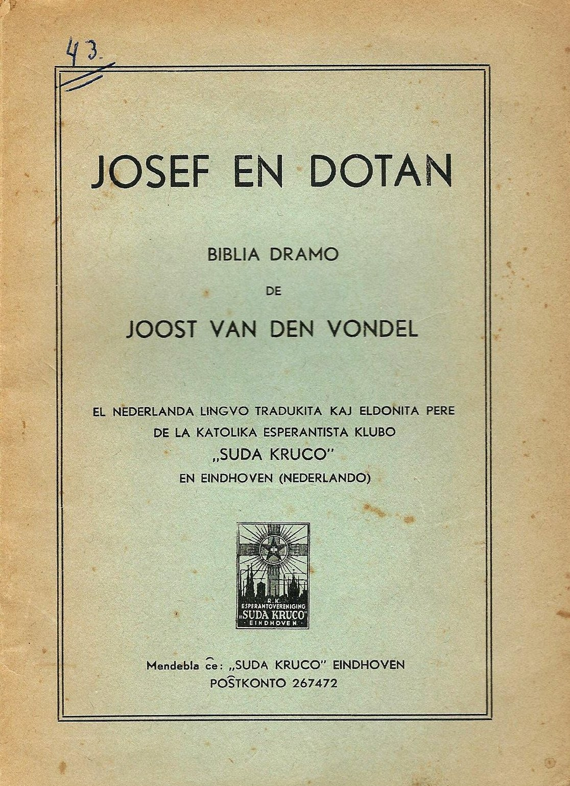 Josef en Dotan